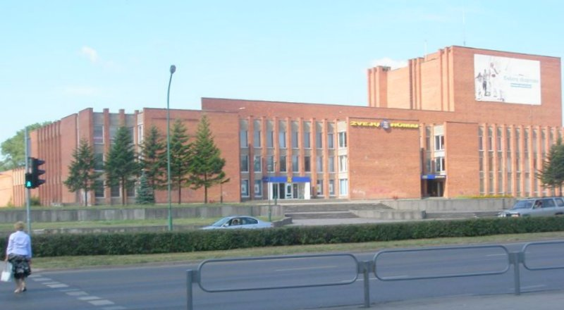 Žvejų kultūros rūmai Klaipėdos Baltijos mikrorajone prie Taikos prosp.